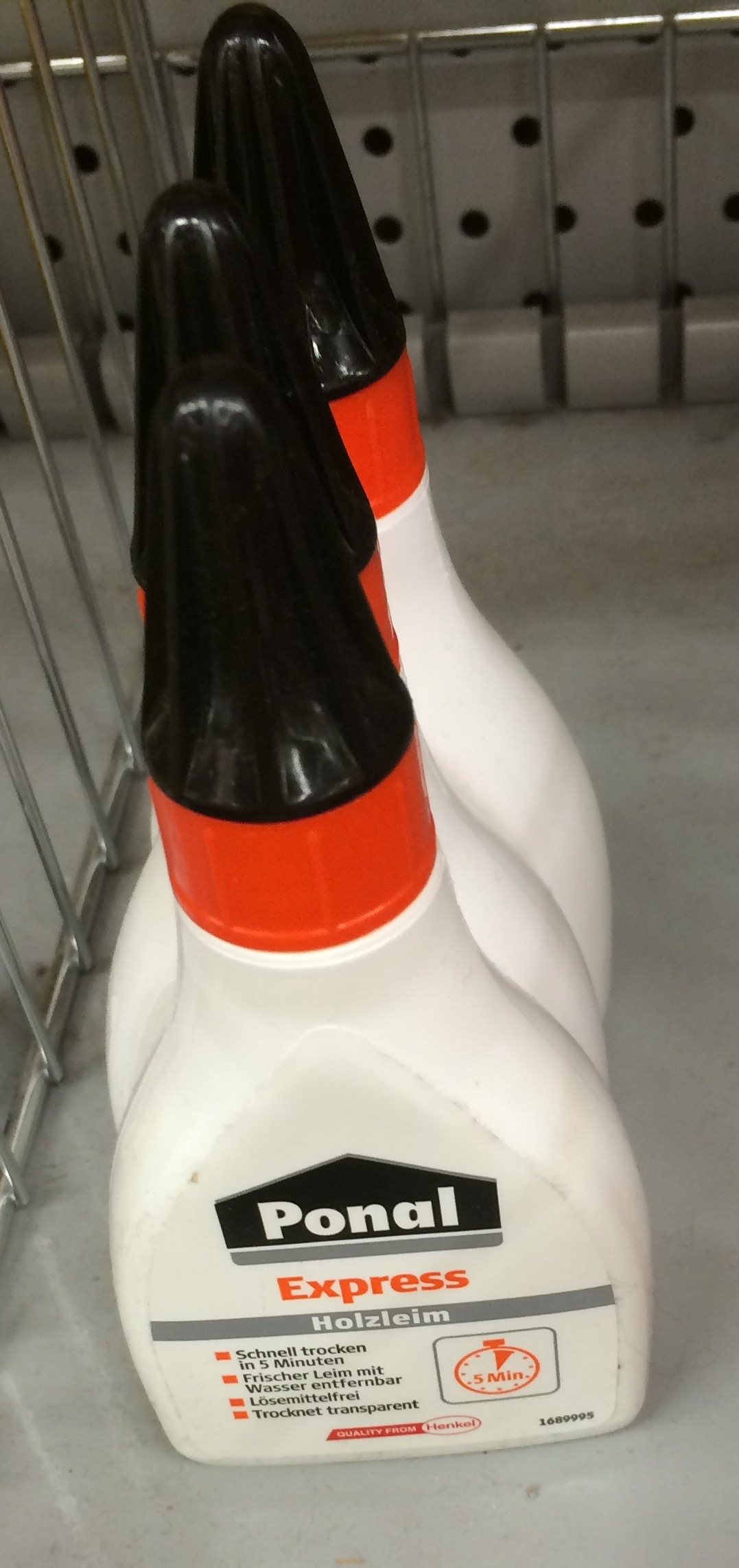 Klebstoff Ponal